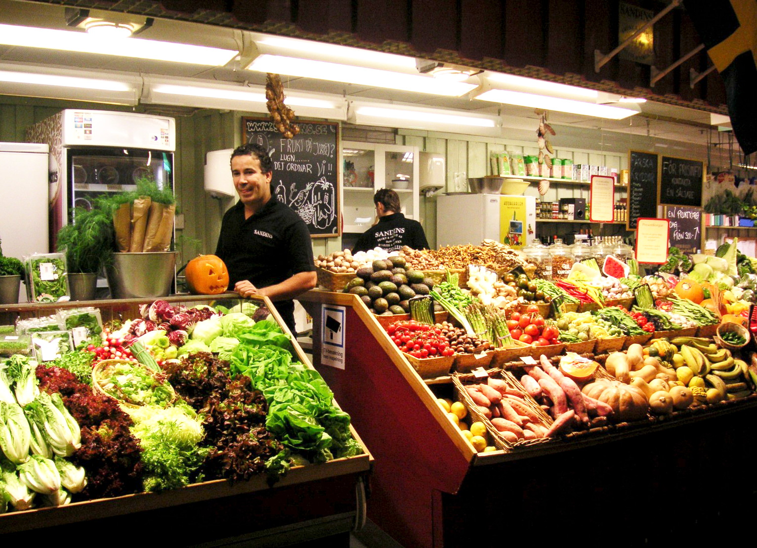 Hötorshallen i Stockholm